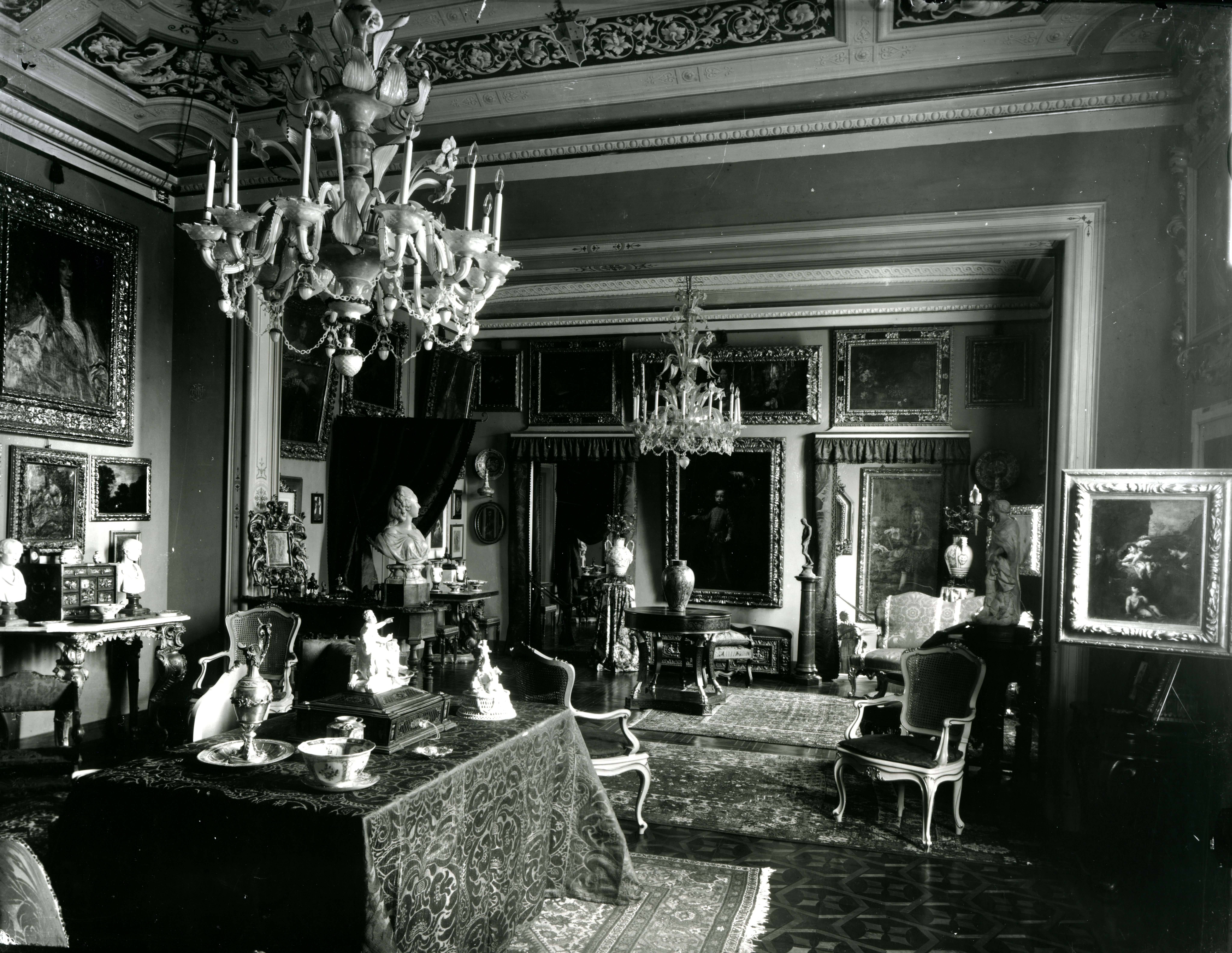 interno di un ambiente di palazzo Campori in via Ganaceto a Modena